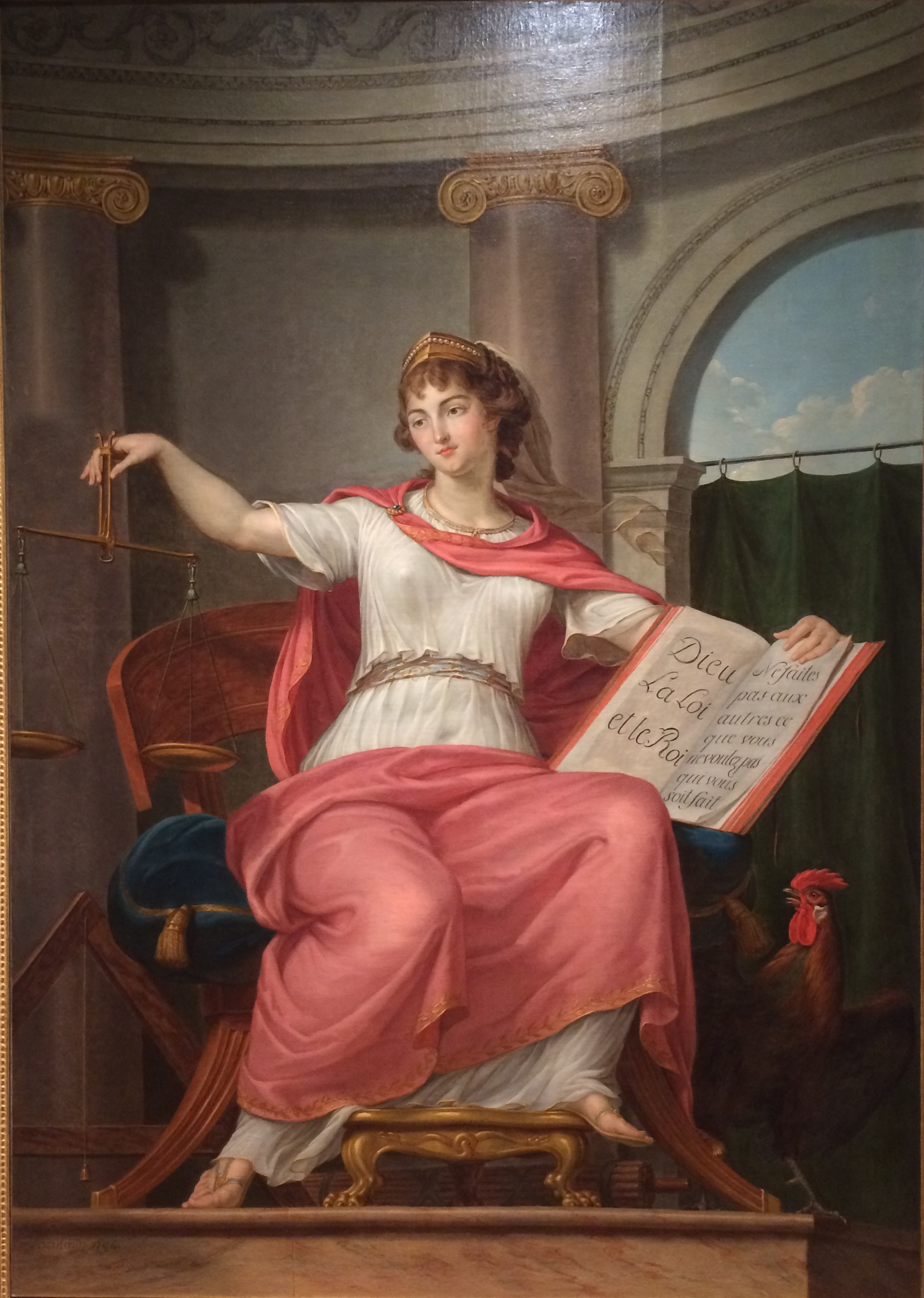 Bernard d'Agesci, Thémis ou La Justice, huile sur toile, 1794 Musée Bernard d'Agesci, Niort Don du Président du Tribunal de Niort